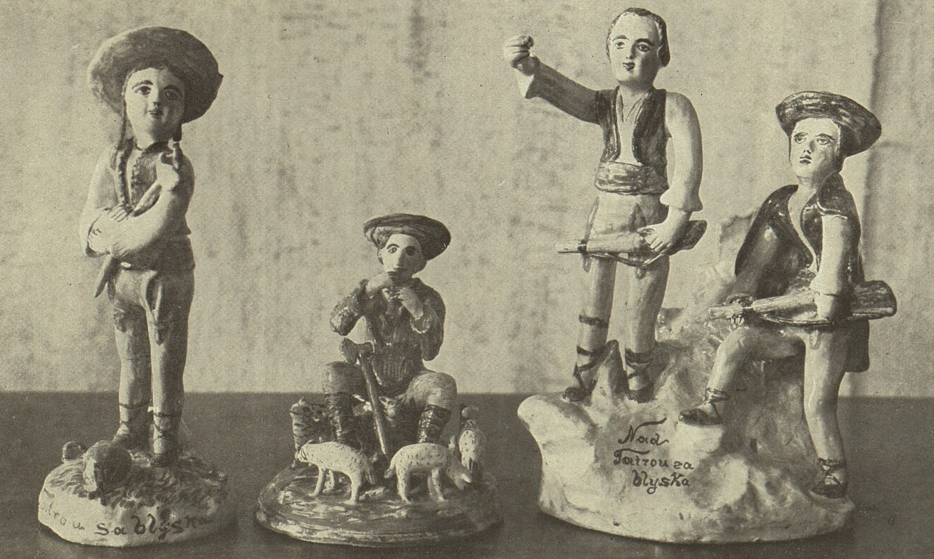 Figurky lidového řezbáře Ferdiše Kostky (1878-1951)